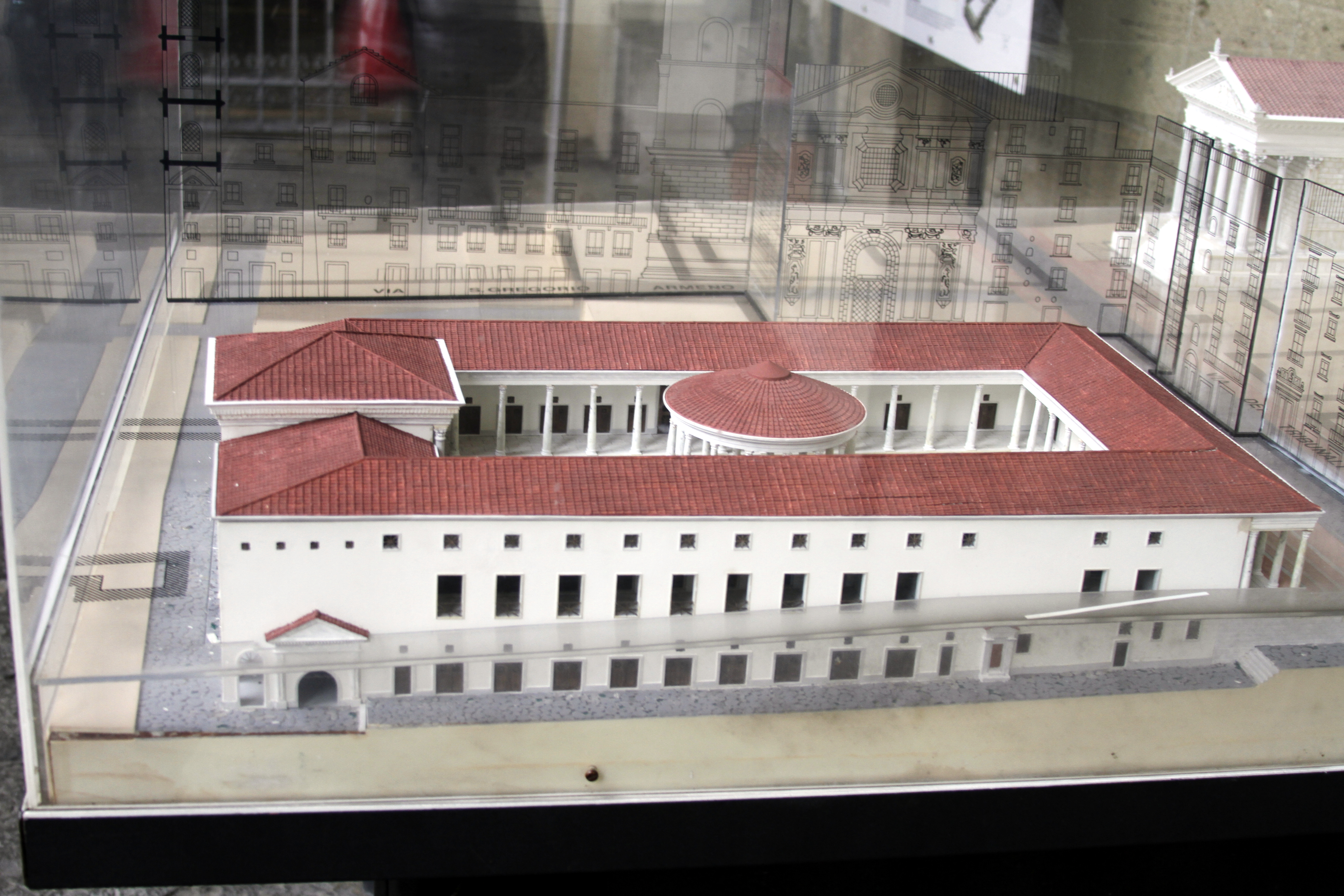 San Lorenzo Maggiore, Nápoles